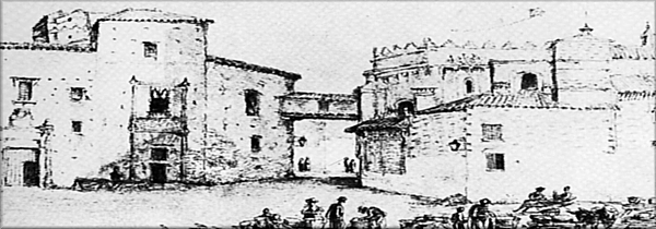 Palacio de los Marqueses de La Algaba grabado en1831